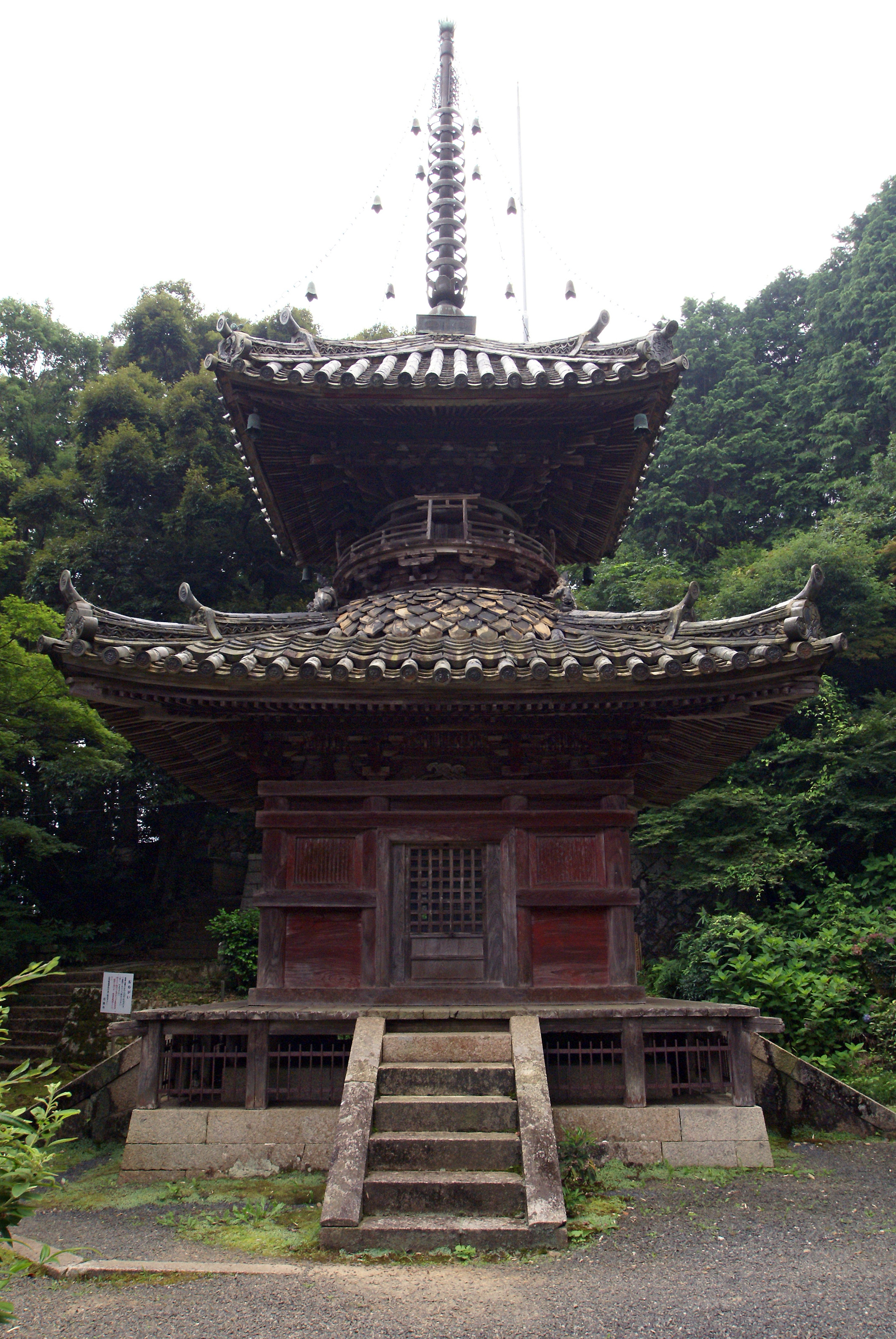 Enryuji in Maizuru, Kyoto prefecture, Japan